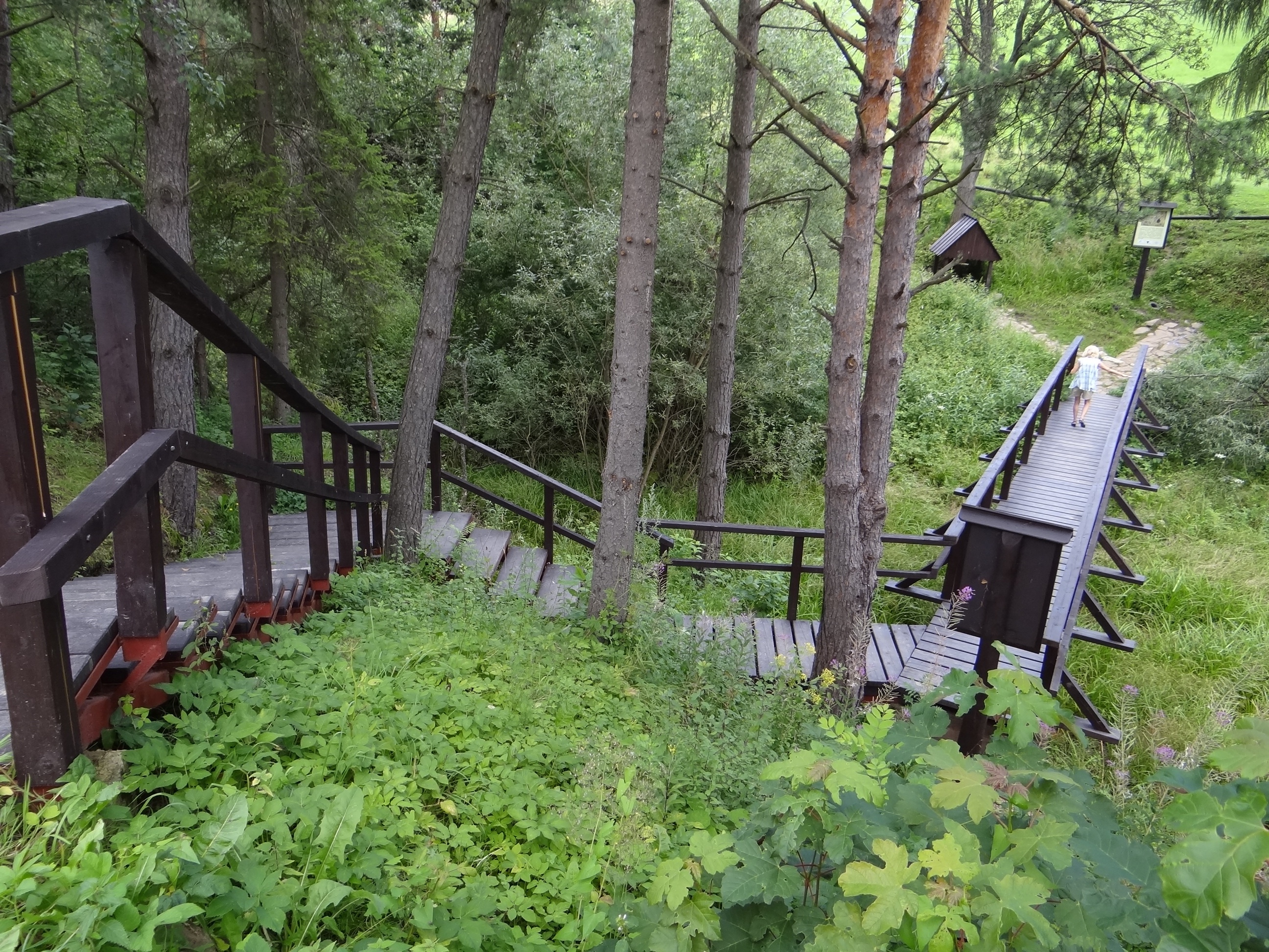 Mofeta w Jastrzębiku